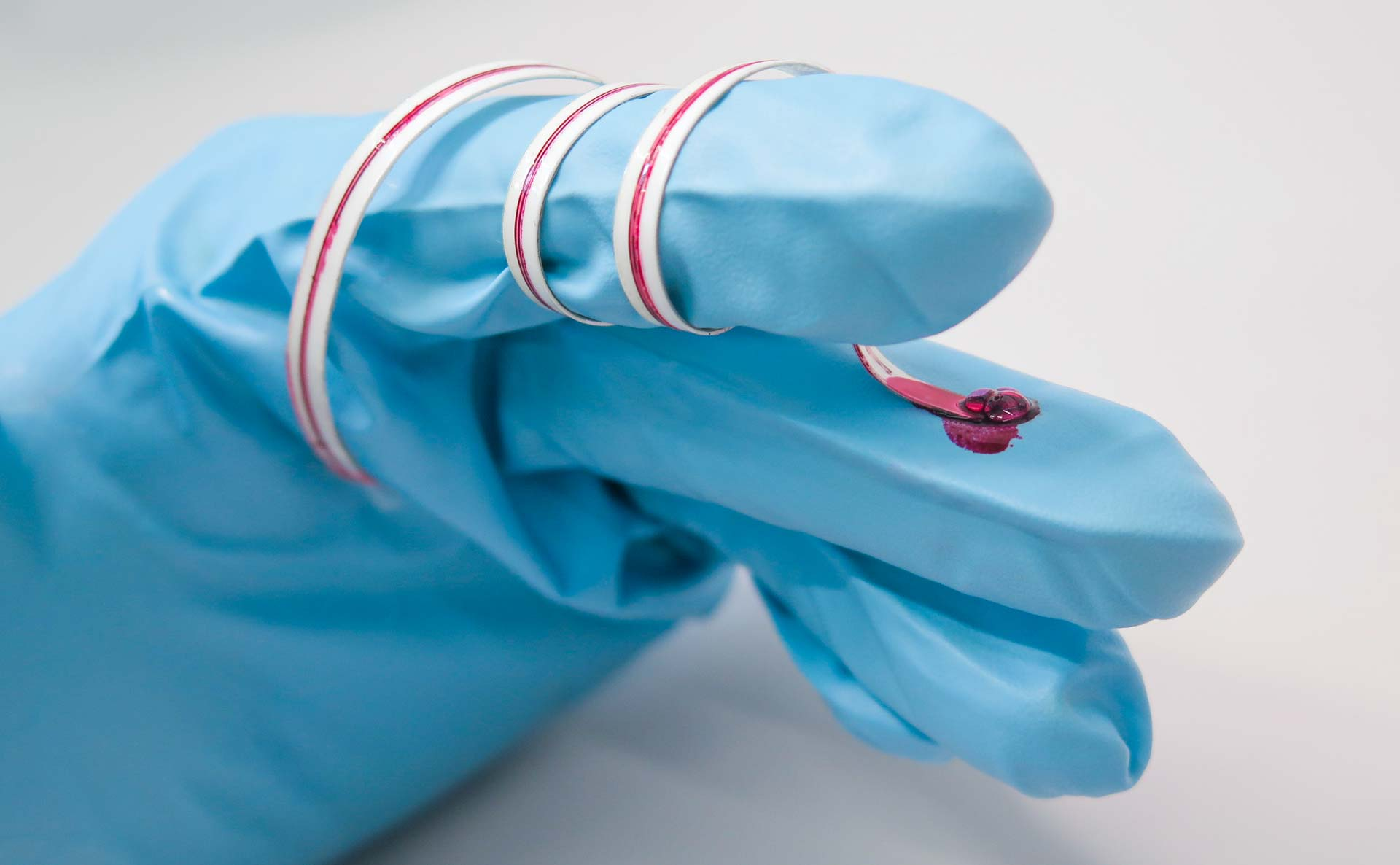 Ein Mikrofluidik Sensor ermöglicht es fluidische Kanäle direkt in den Foliensensor zu integrieren.